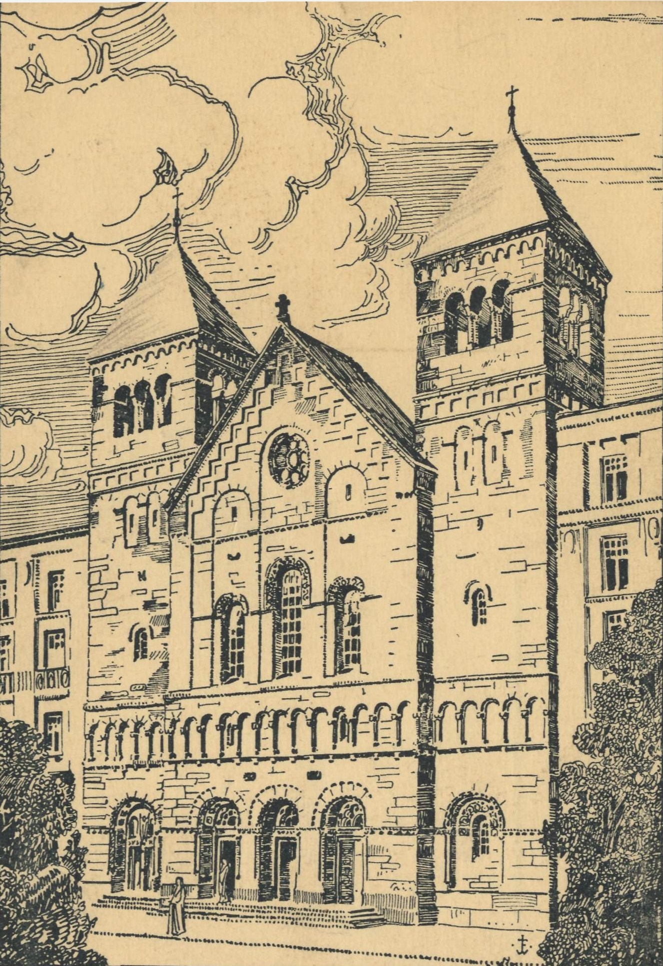 Historische Ansicht der St.-Josephskirche in Berlin-Wedding (1907)